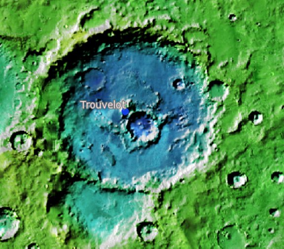 Cráter marciano . (Imagen IAU/USGS/Goddard/A SU/USGS)